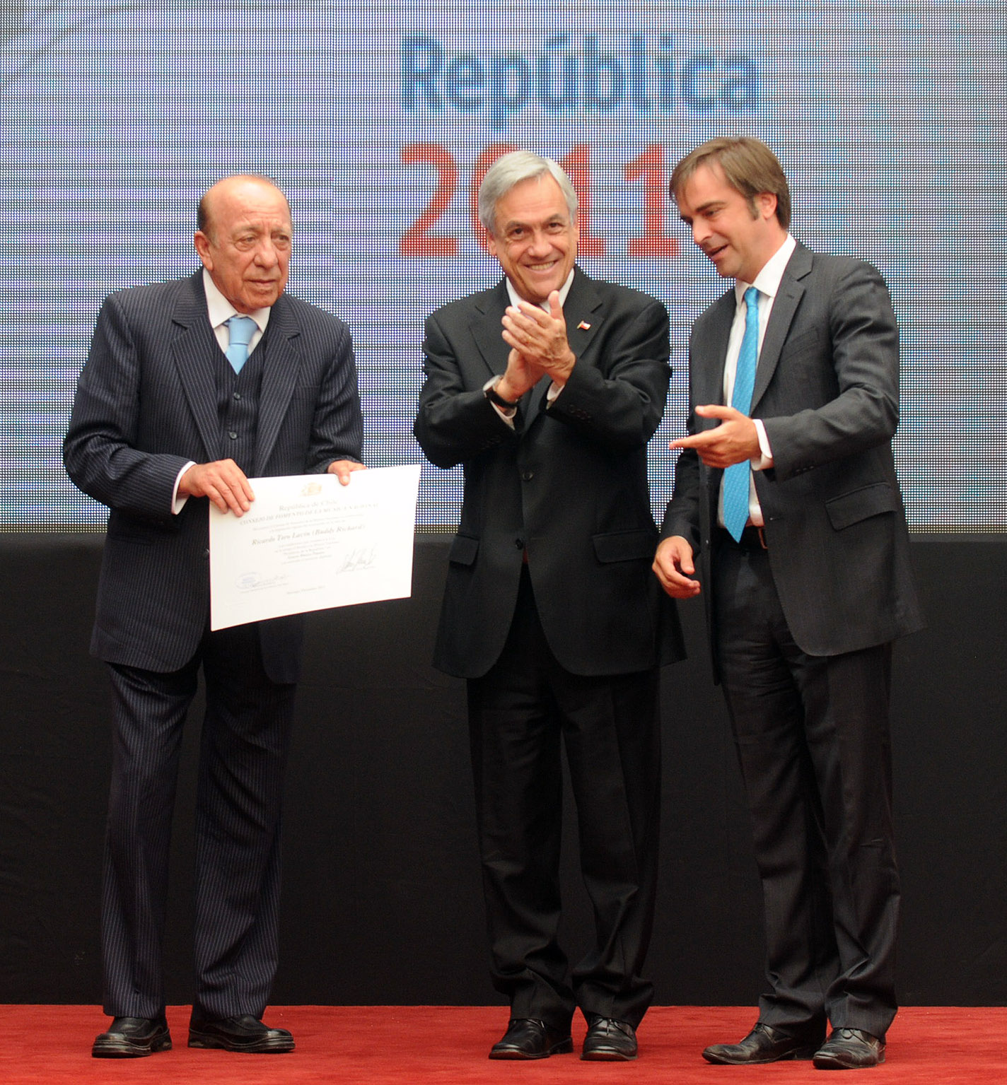 17-01-2012 Premio a la Música